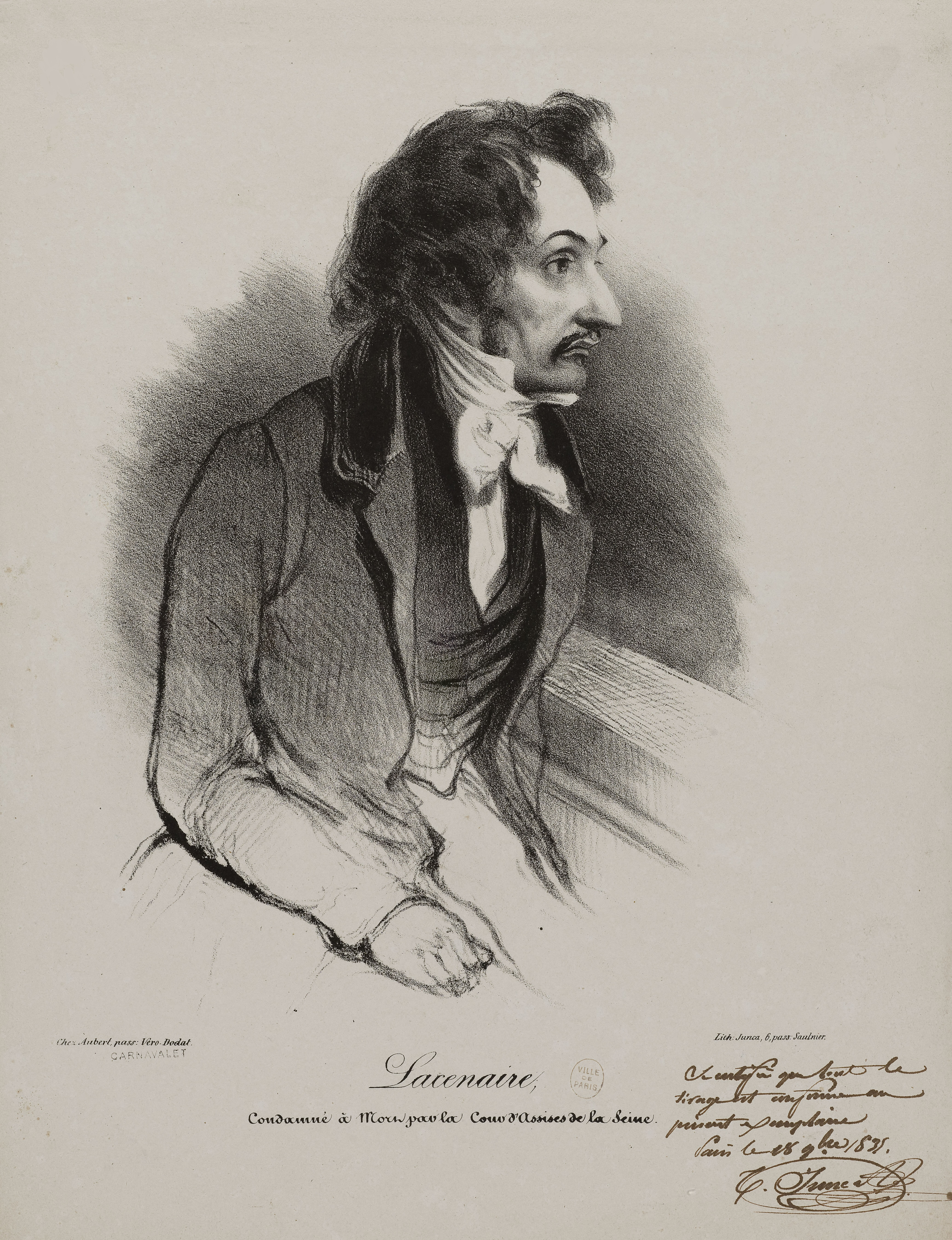 Portrait de Pierre-François Lacenaire, de profil. Lithographie de Pierre Théophile Junca, 1835.